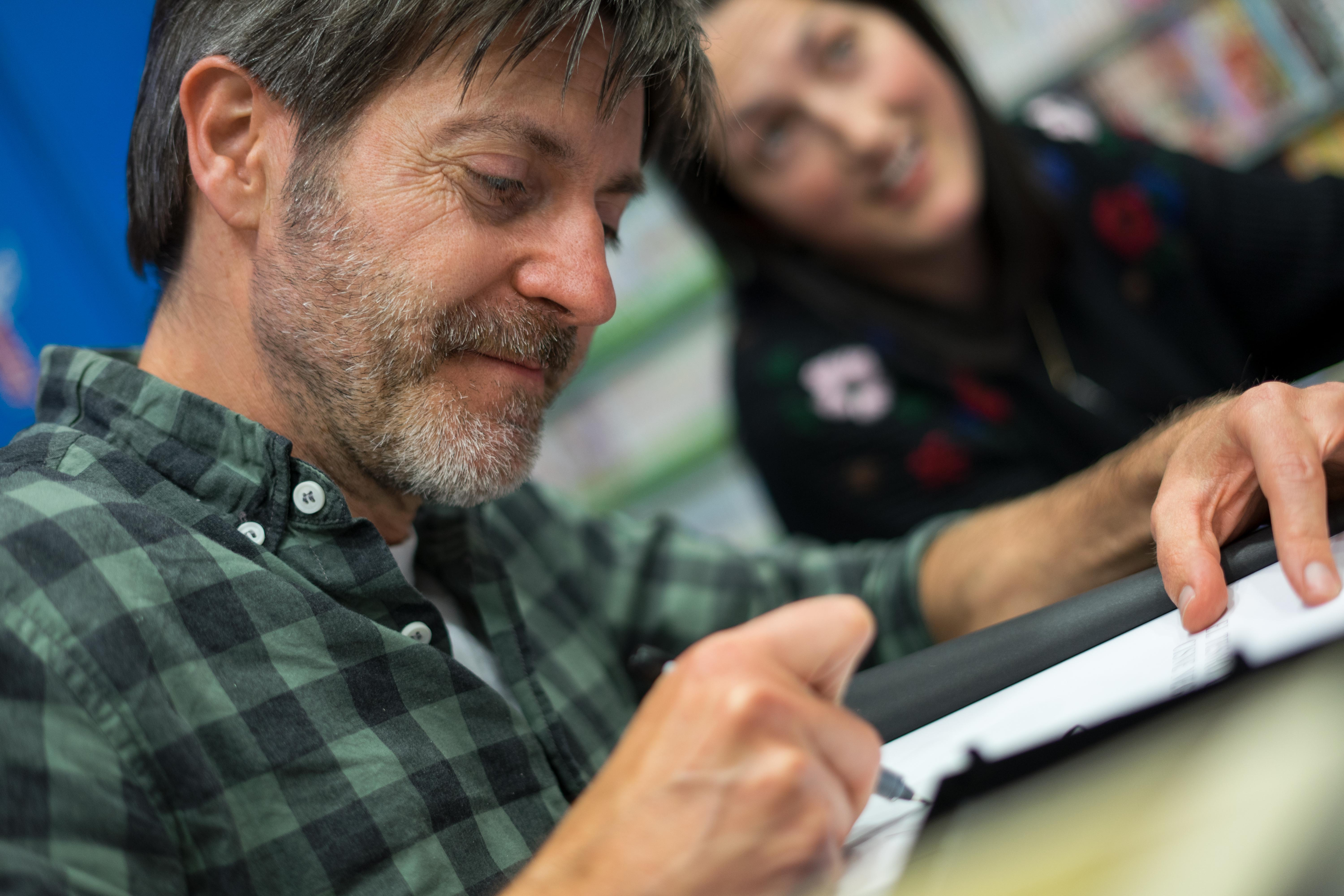 Paco Roca debuxando unha dedicatoria tras unha charla de presentación de El Tesoro del Cisne Negro na Coruña